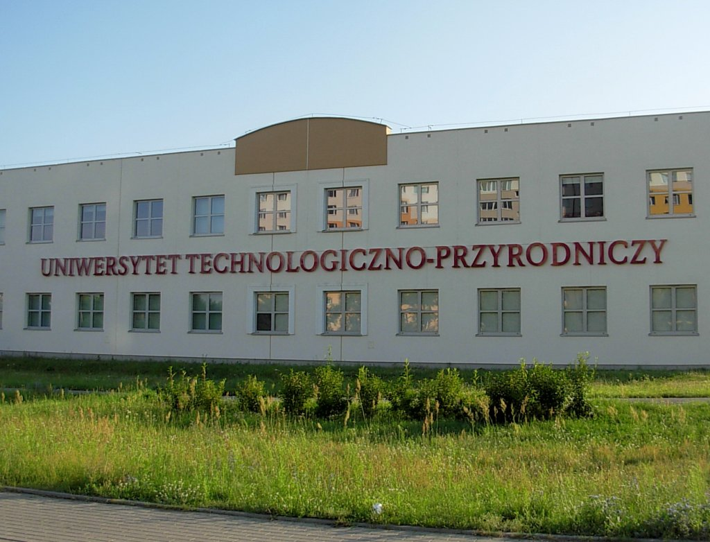 Regionalne Centrum Innowacyjności Uniwersytetu Technologiczno-Przyrodniczego w Bydgoszczy